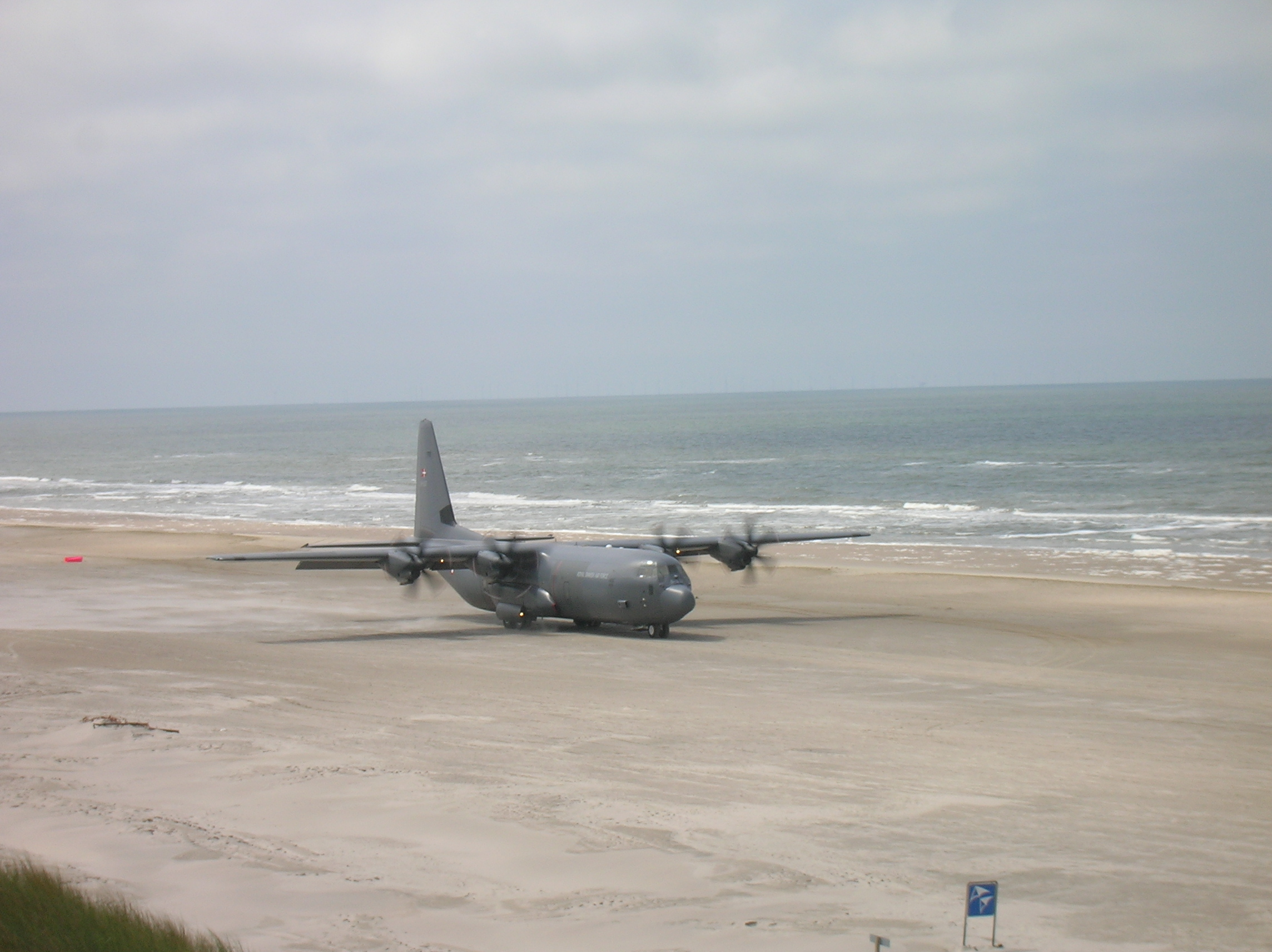 Auf Vejers Strand landende Lockheed C-130 der Dänischen Luftstreitkräfte